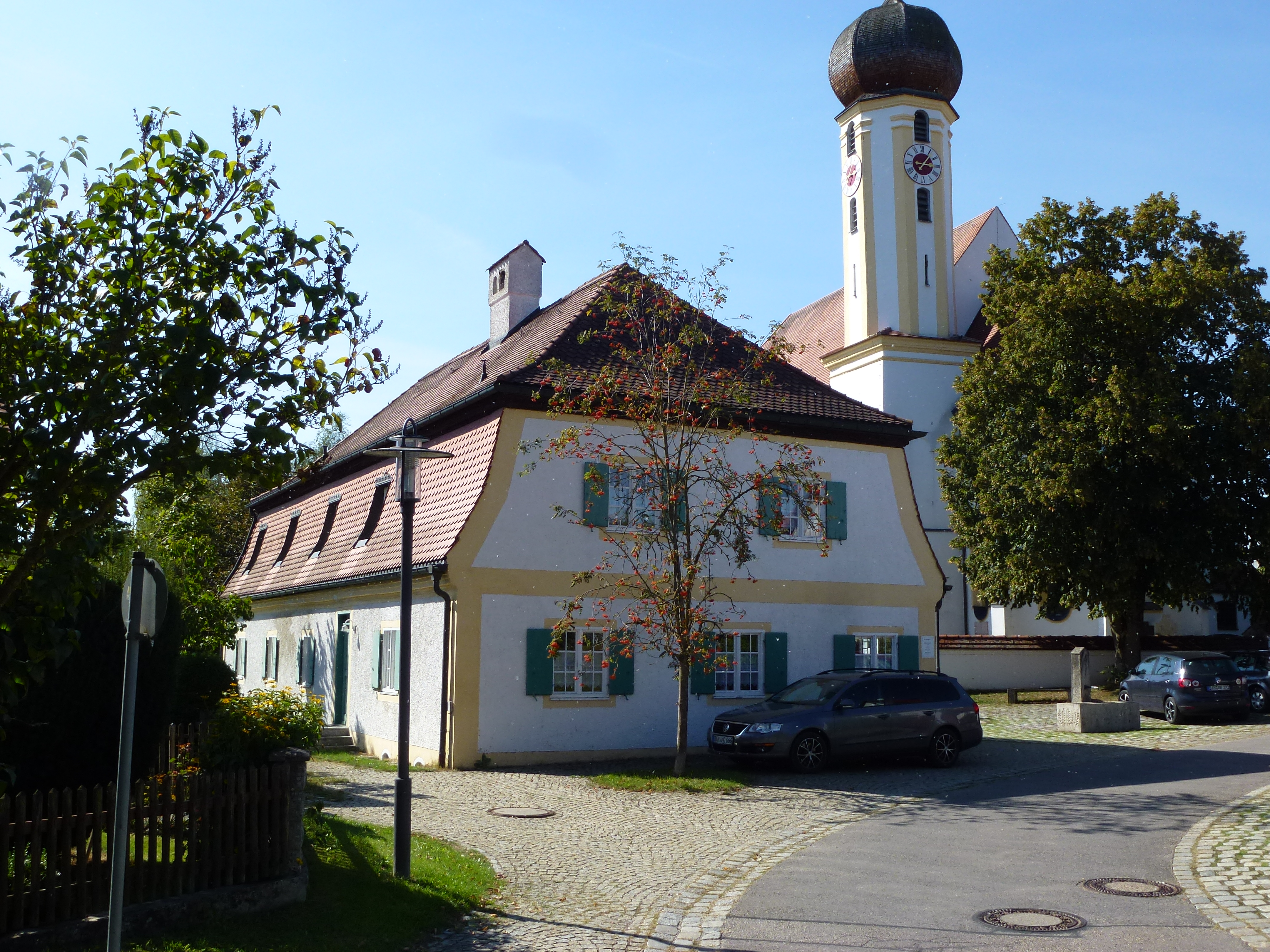 Hilgertshausen, Kirchgasse 5: Katholische Pfarrkirche St. Stephan. Ansicht von OSO